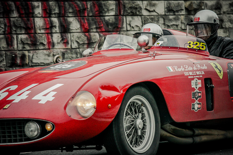 MILLE MIGLIA 2012 - SS della Futa a Pianoro (BO): Ferrari 500 Mondial. This is a 1955 model, serial number 0528MD, first delivered to conte Carlo Leto de Priolo of Milano.[1]